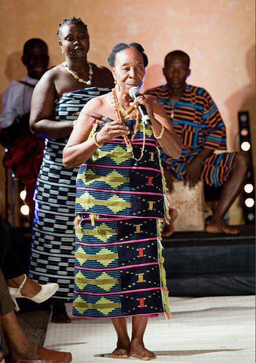 La chanteuse allah therese habillé avec un seul morceau de pagne baoulé avec des parus baoulé autour du cou This is an image of Cultural Fashion or Adornment from Ivory Coast